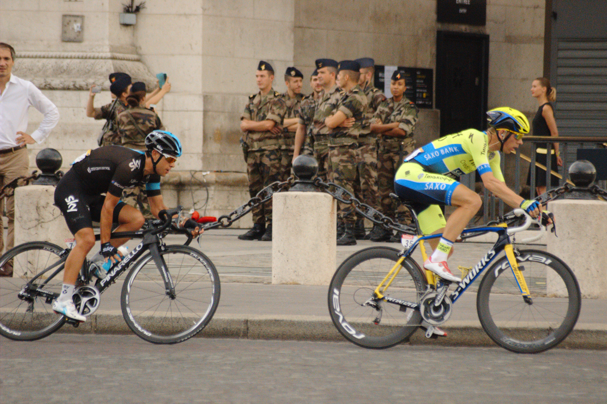 21è étape du Tour de France 2014, Evry-Paris Champs Elysées, photo prise à Paris au pied de l'Arc de Triomphe.